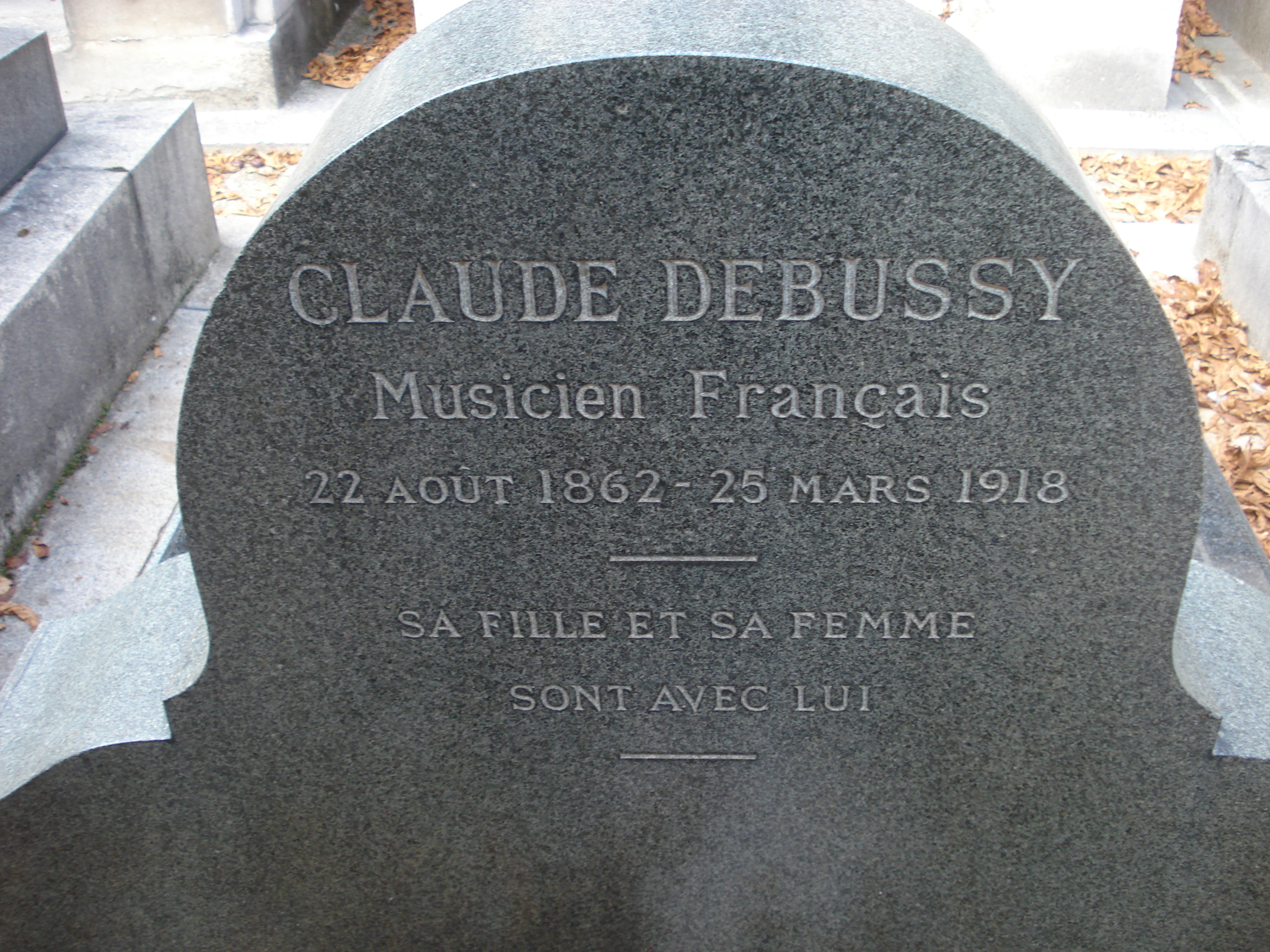 Claude Debussy compositeur, né le 22 août 1862 à Saint-Germain-en-Laye et mort le 25 mars 1918 à Paris.